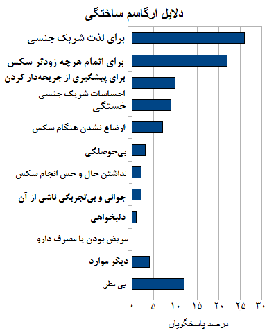 ترجمه ای از نمونه انگلیسی